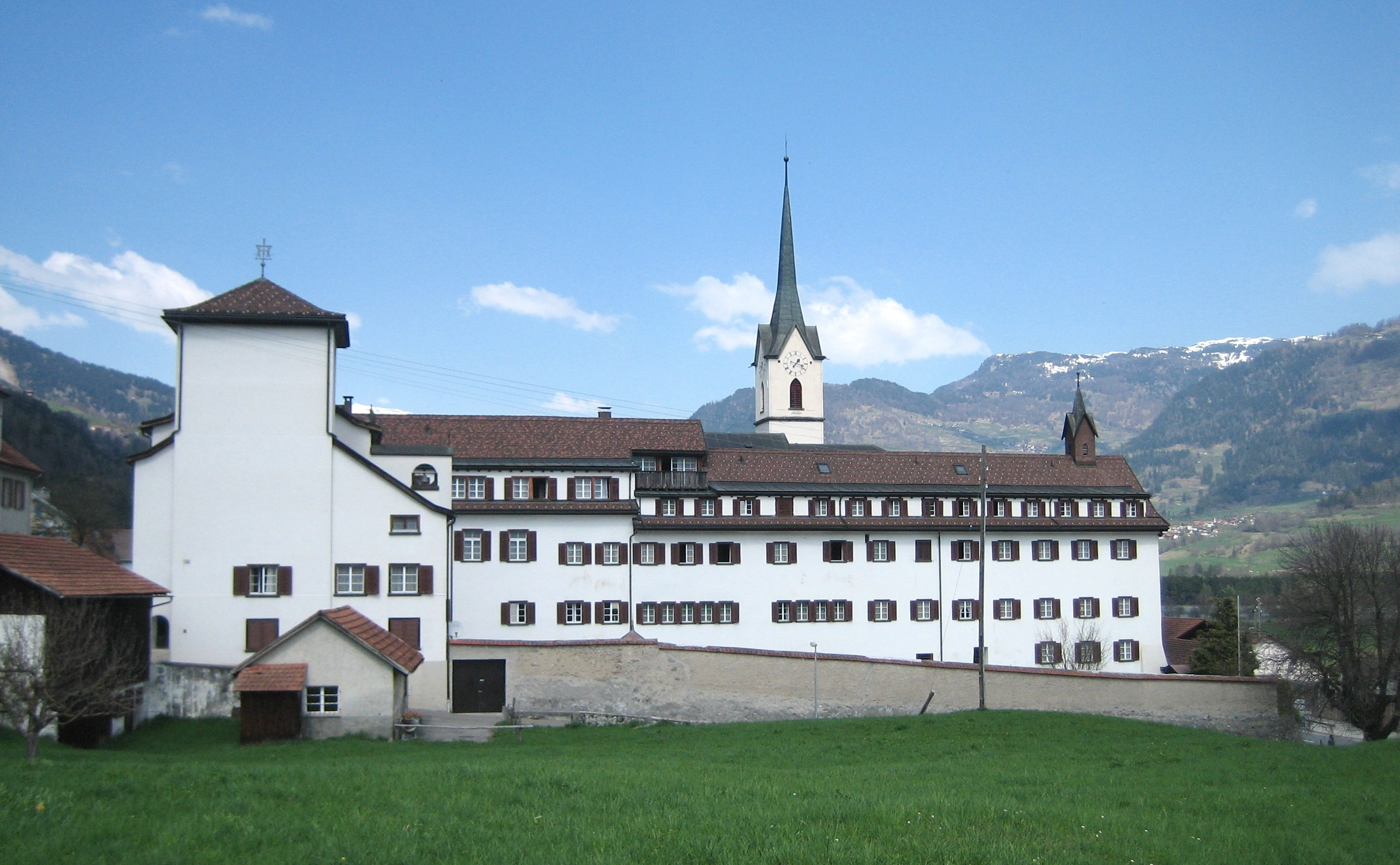 Dominikanerinnenkloster Cazis, Ansicht von Süden